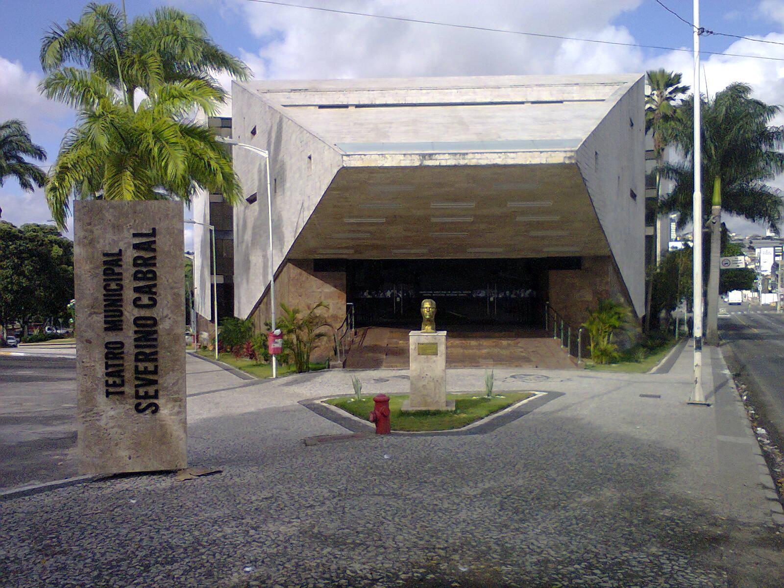 Teatro Municipal Severino Cabral em Campina Grande, Paraíba, Brasil.